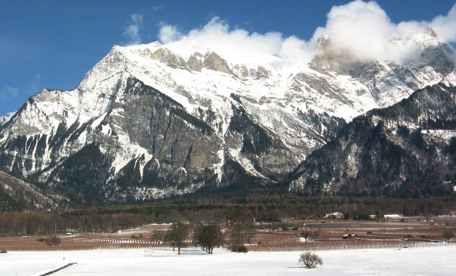 Die Maienfelder Rebberge überragt vom Falknis